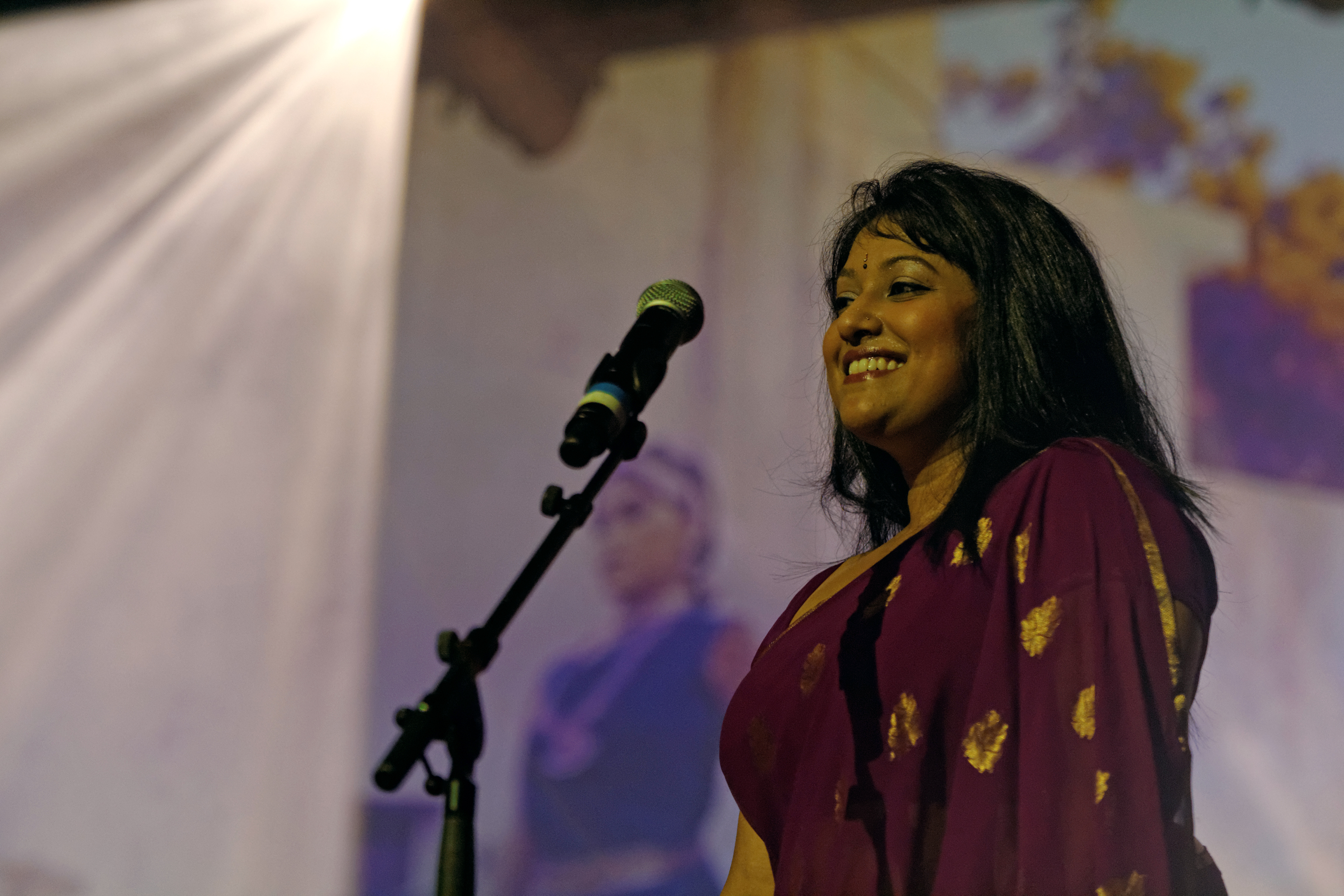 Kavita Baliga avec Olli and the Bollywood Orchestra en concert à l'espace Gradlon lors du festival de Cornouaille le 23 juillet 2014.